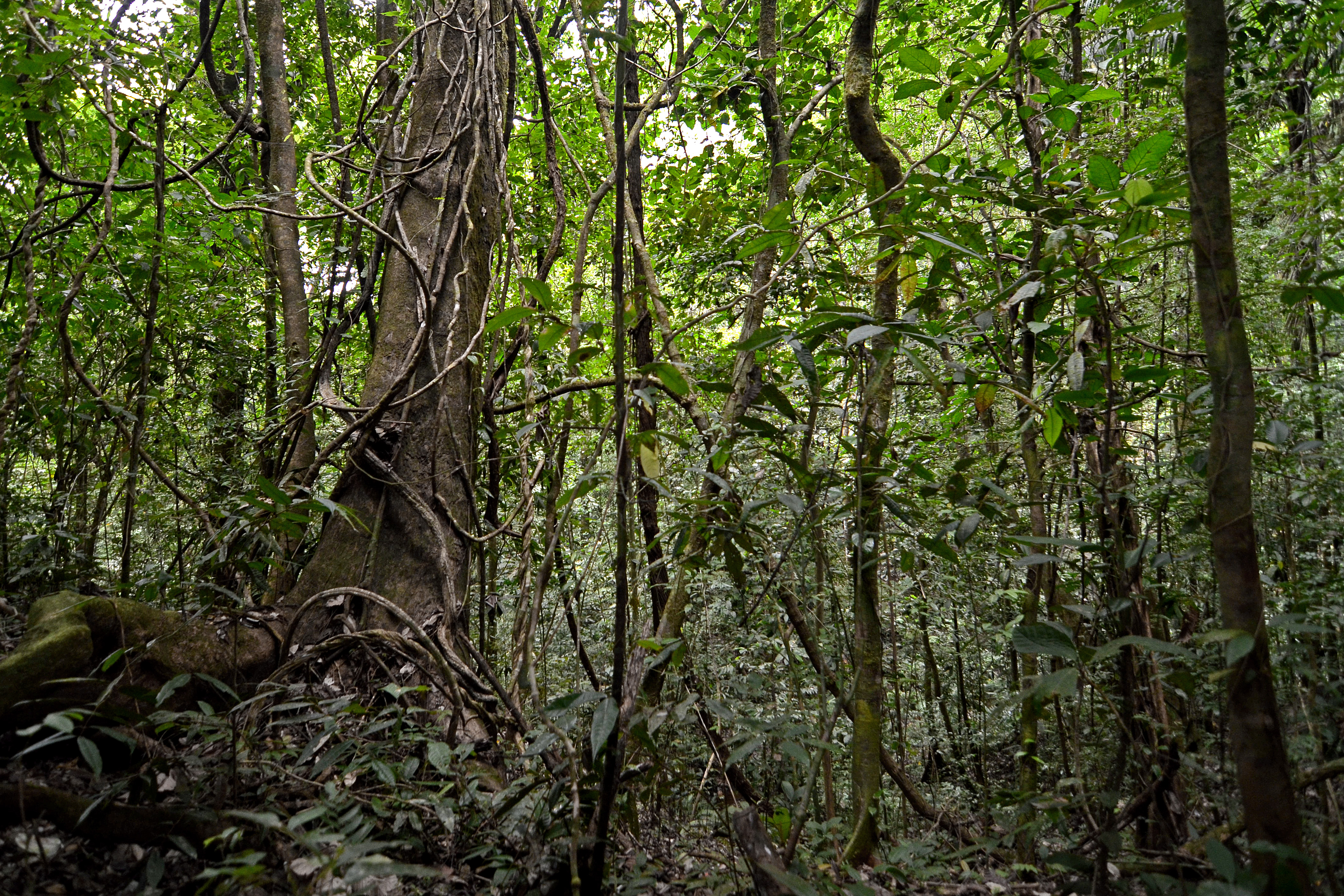 Parque Nacional Soberanía, Colón, Panamá